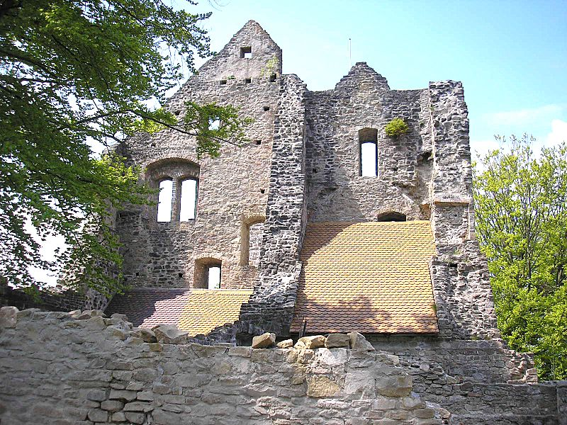 Burg Sulzberg (Markt Sulzberg, Landkreis Oberallgäu, Bayerisch-Schwaben). Die hochmittelalterliche Kernburg nach Westen. Eigene Aufnahme, Mai 2008 / Sulzberg castle near Sulzberg (Landkreis Oberallgäu, Bavaria, Germany). The High Middle Ages central castle, looking west . Own photo, May 2008